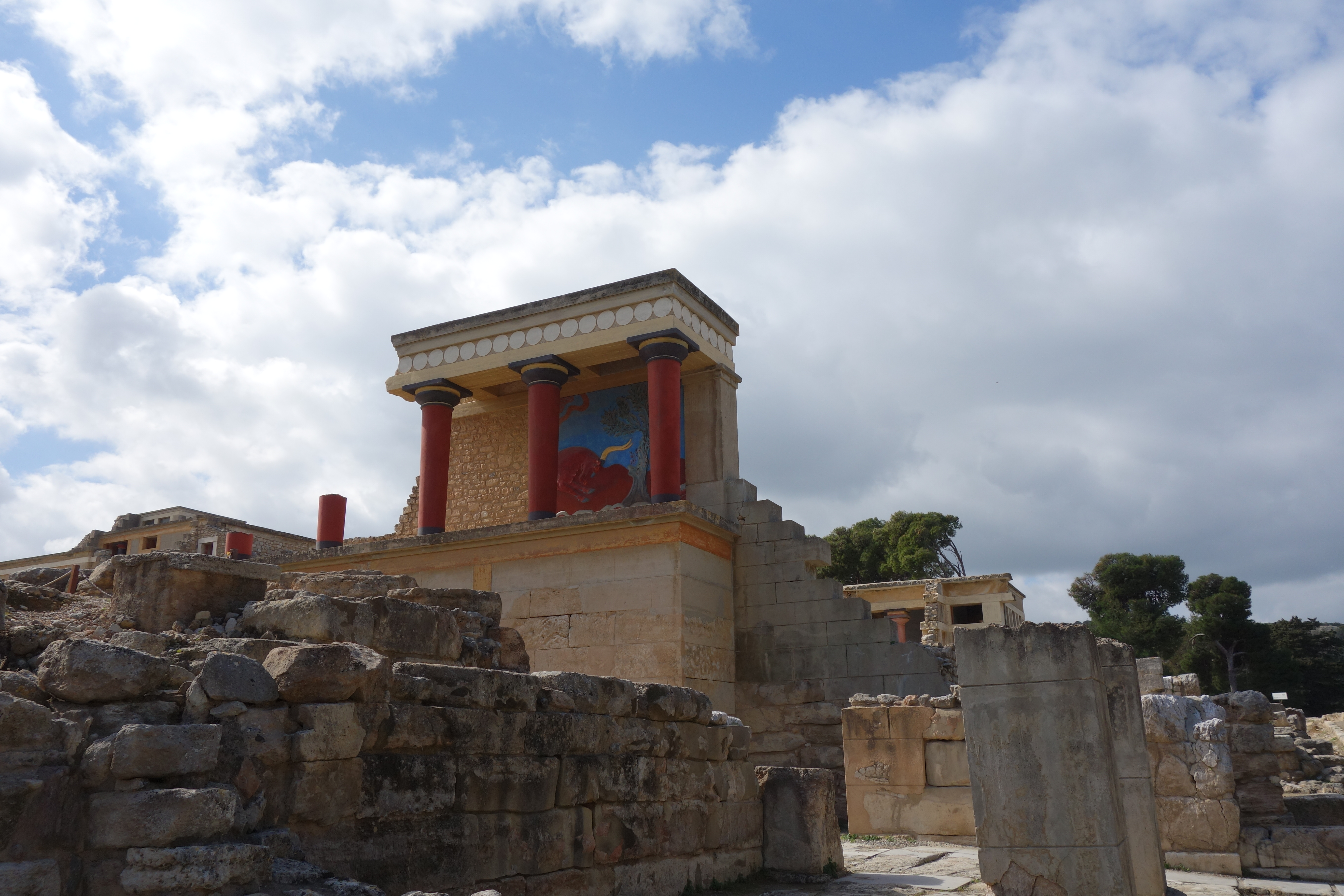 クノッソス宮殿